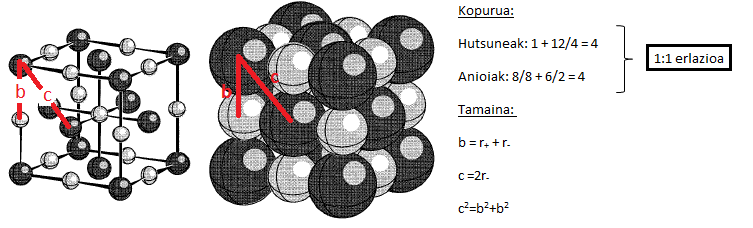 Aurpegietan zentraturiko egitura kubikoaren adibidea